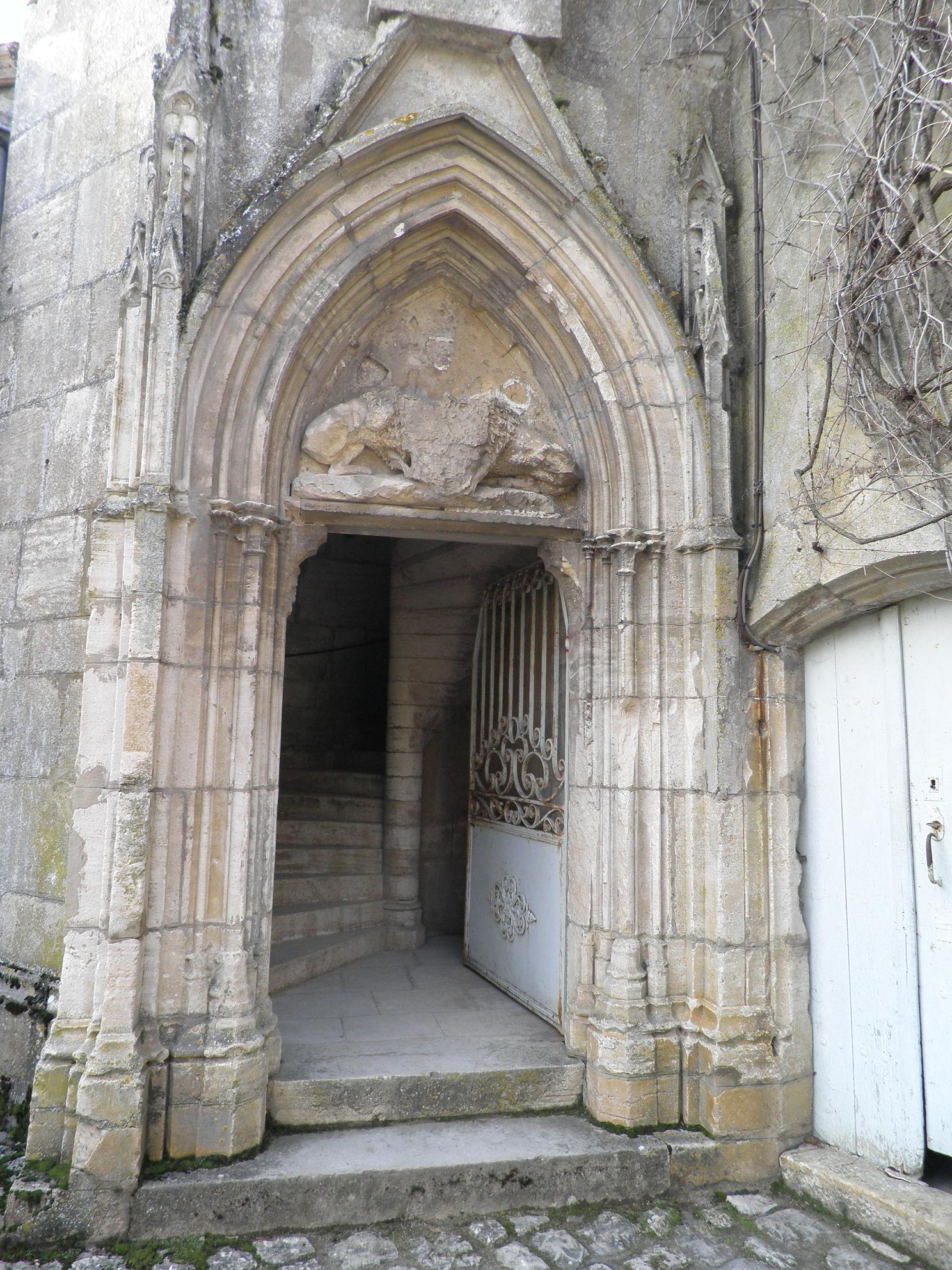 Entrée de la grand vis du château de Germolles